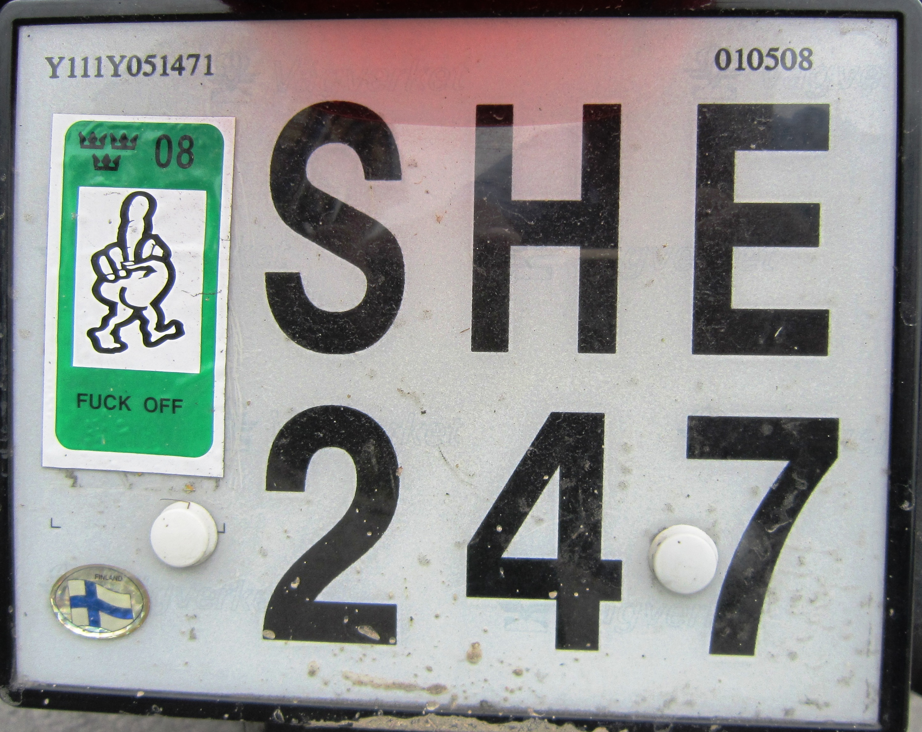 Zweden kenteken motorfiets oud